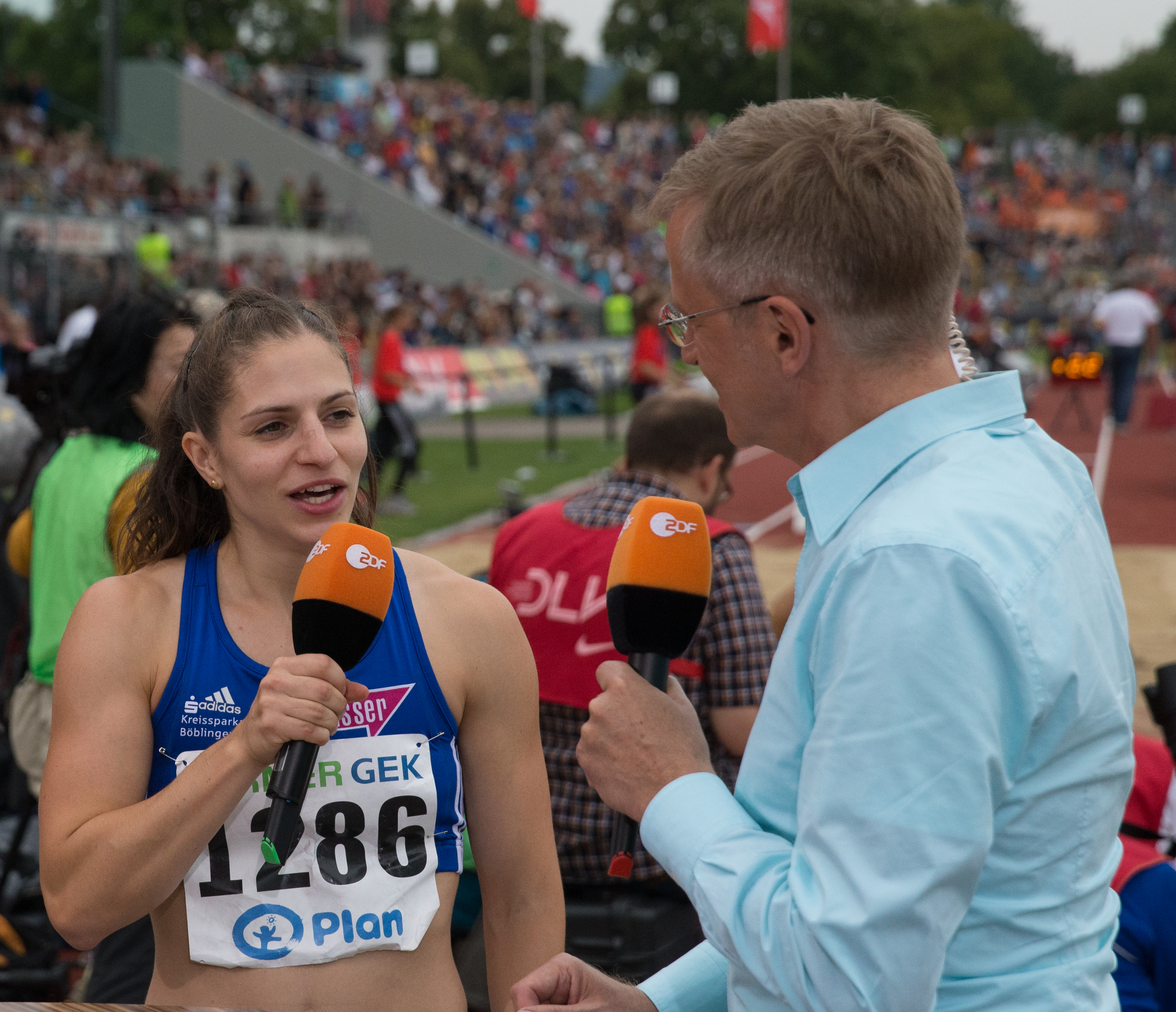 114. Deutsche Leichtatheltik Meisterschaften 2014 in Ulm - 100m Frauen. Starterin: Nadine Hildebrand - Alle Ergebnisse/Teilnehmer unter